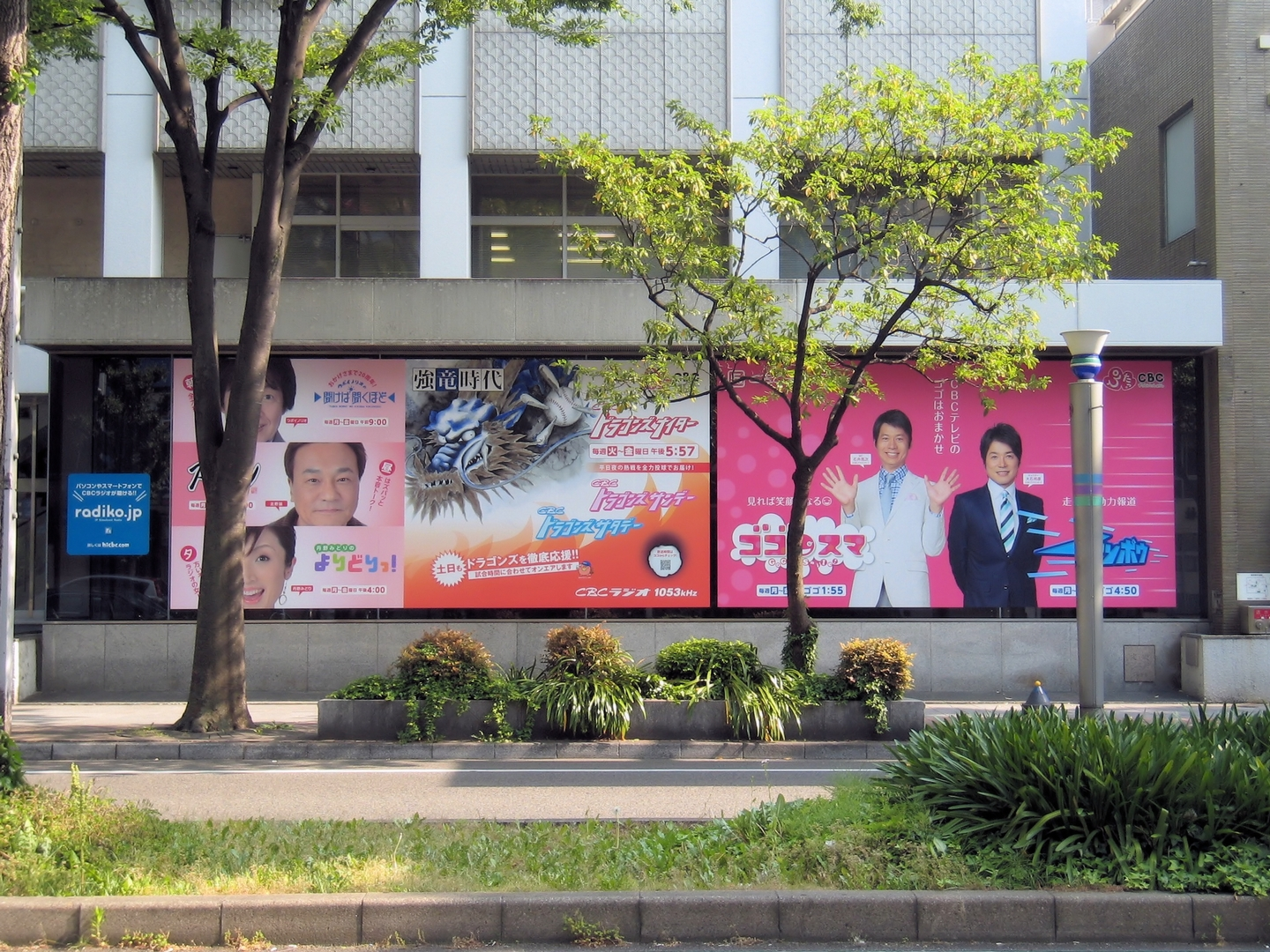 CBC会館1階のスタジオギャラリー